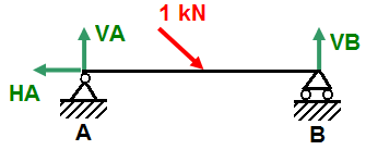 zelf, paint (+ pijltjes uit word) / MADe 28 okt 2005 20:39 (CEST)